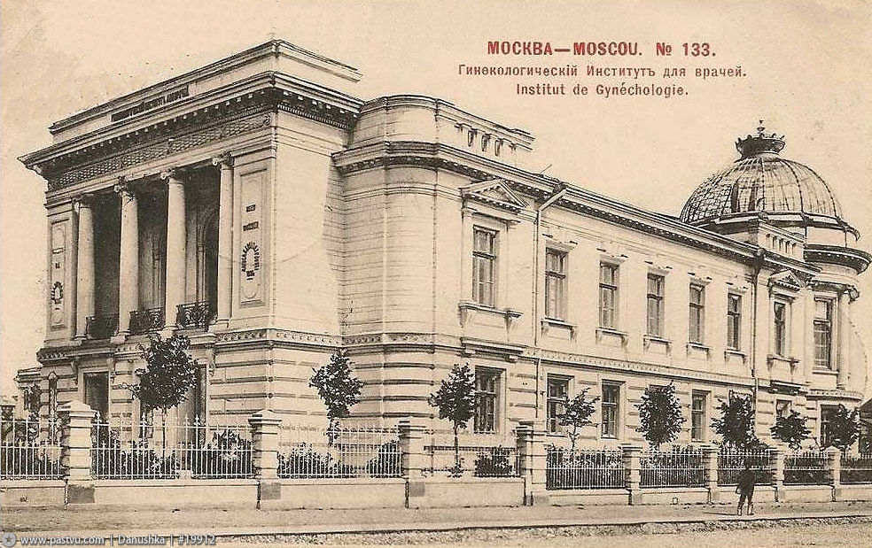 Гинекологический институт или Институт усовершенствования гинекологов имени А. П. Шелапутиной на Большой Пироговской. В 1896 году Московскому университету было передано выстроенное и оснащённое здание института.